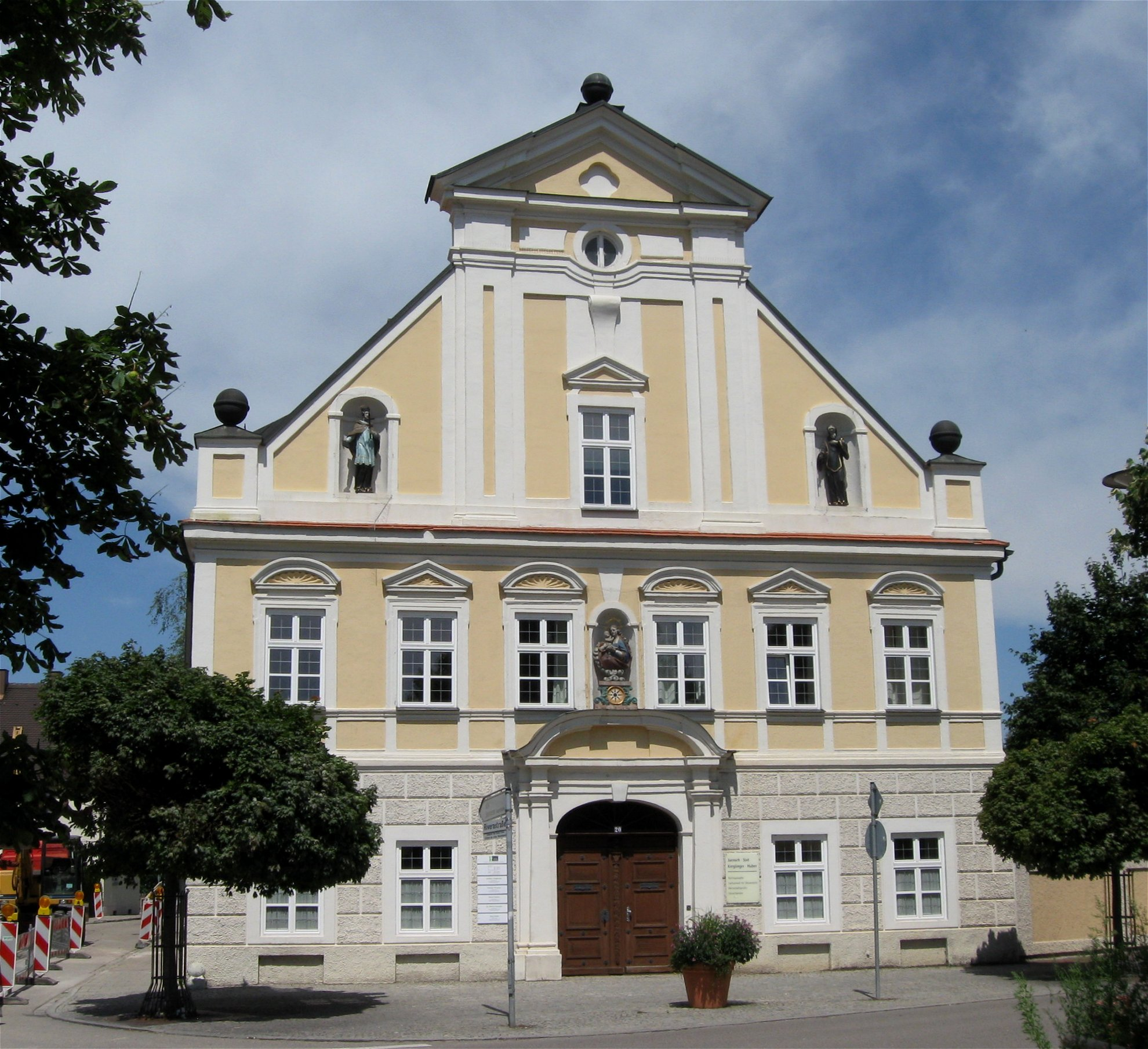 Münchner Straße 20. Palais Rivera, Wohnhaus mit hohem Giebel und Nischenfiguren, 1712, 1938 durch Brand teilzerstört (ehem. Notariat).